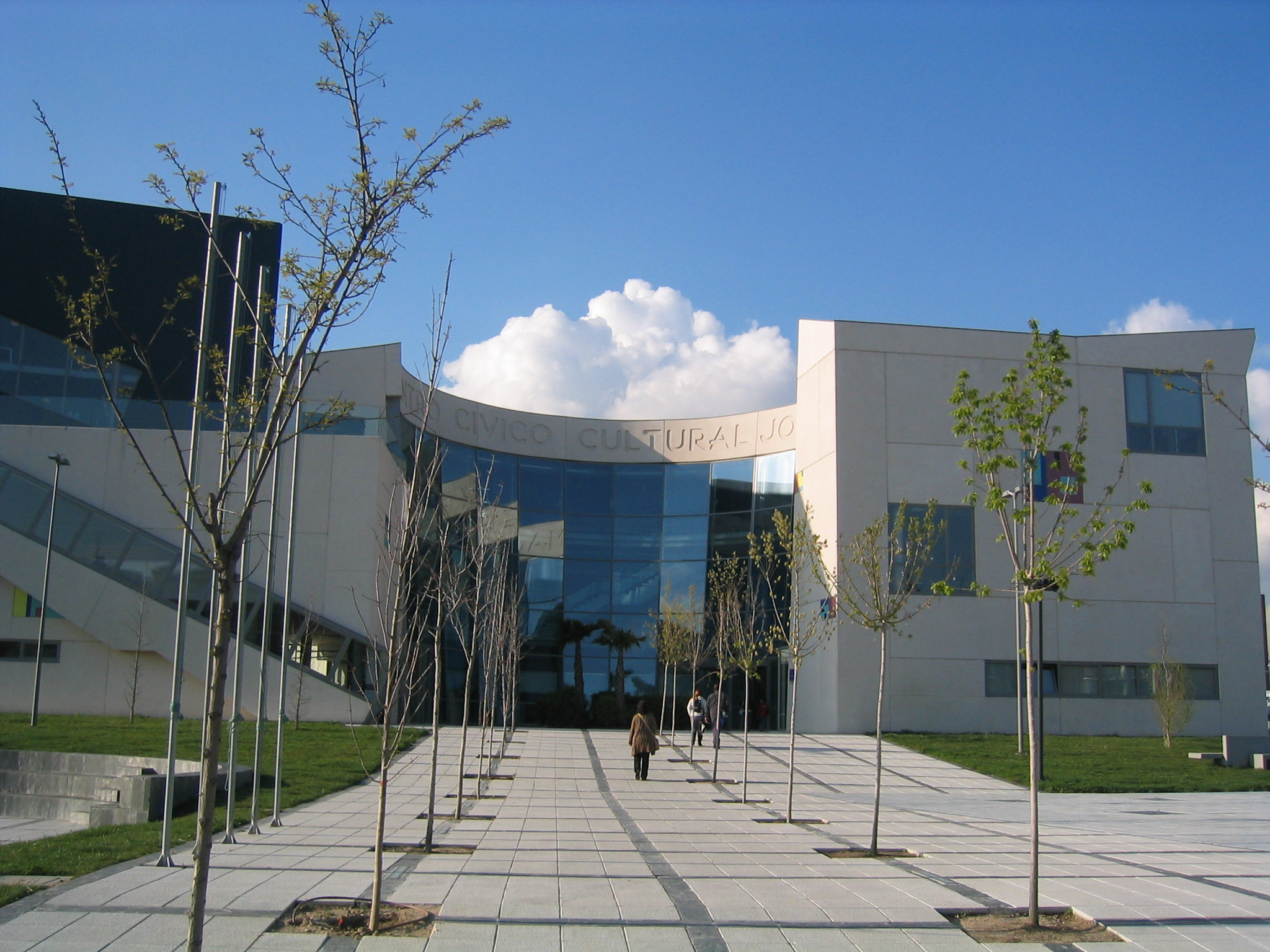 Centro Cívico José Saramago, sede de la Junta de Distrito de San Nicasio, Leganés (Madrid). España.